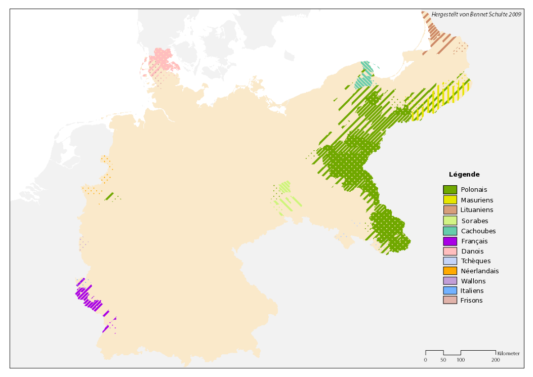 Les minorités linguistiques au sein de l'Empire allemand en 1900.